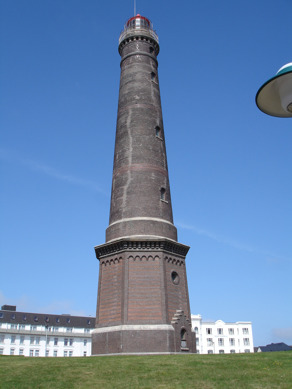 Nije Fjoertoer.